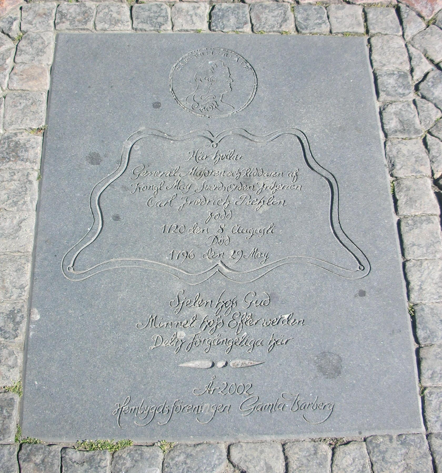 General Carl Fredrik Pechlins grav i Varberg.